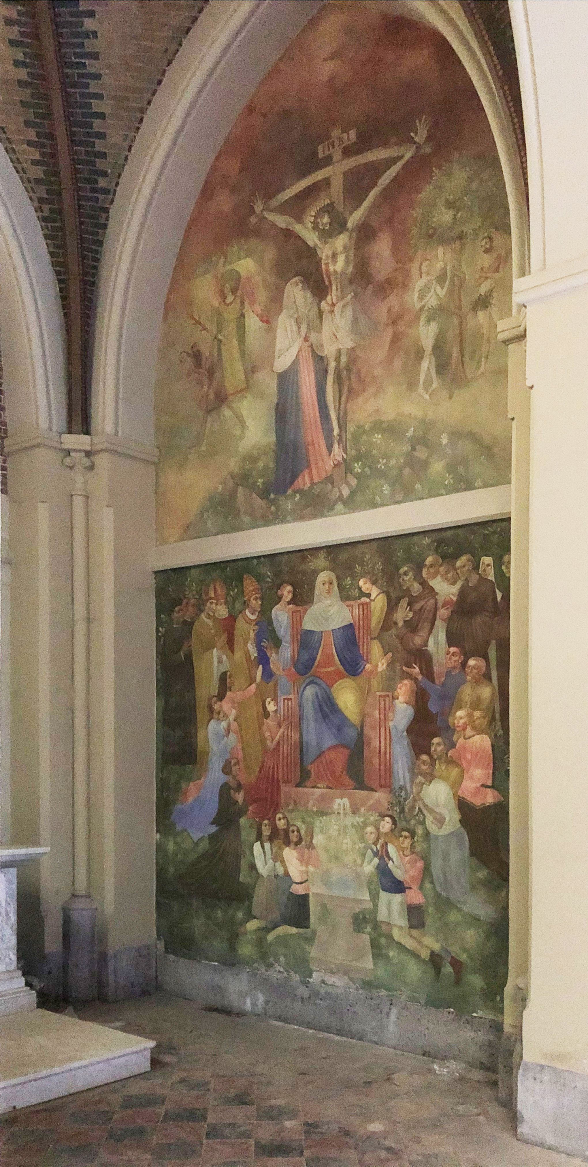 muurschildering in Mariakapel H.Hartkerk Breda